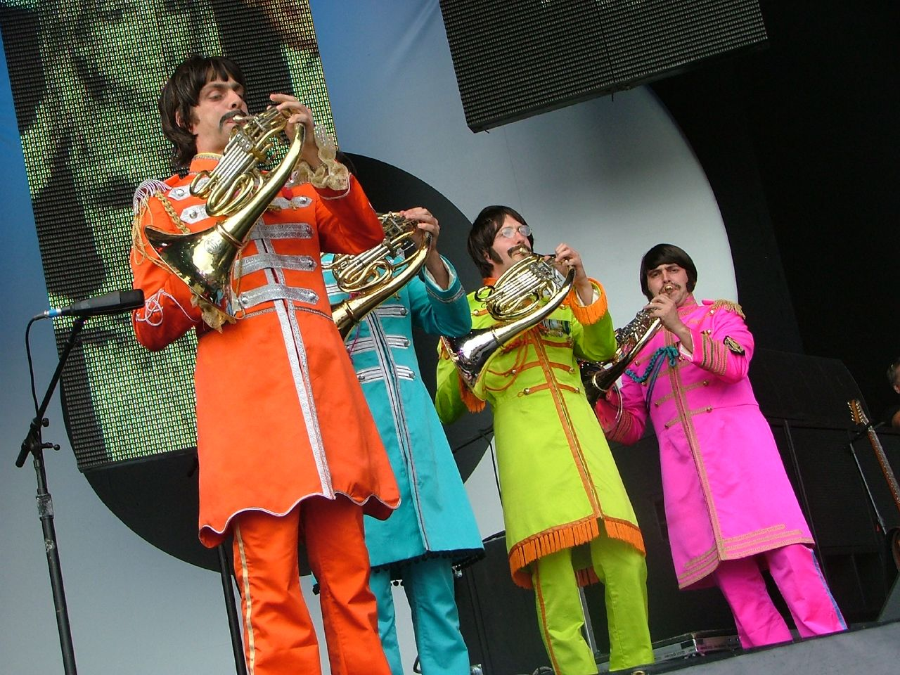 "Sgt. Peppers" band at Live8.